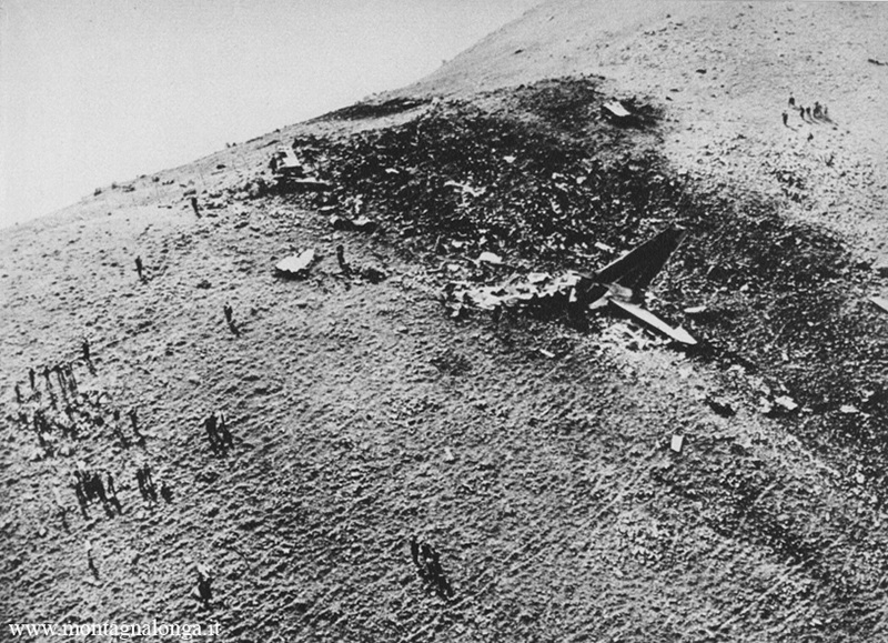 Последствия авиационной катастрофы самолёта Douglas DC-8 близ Палермо